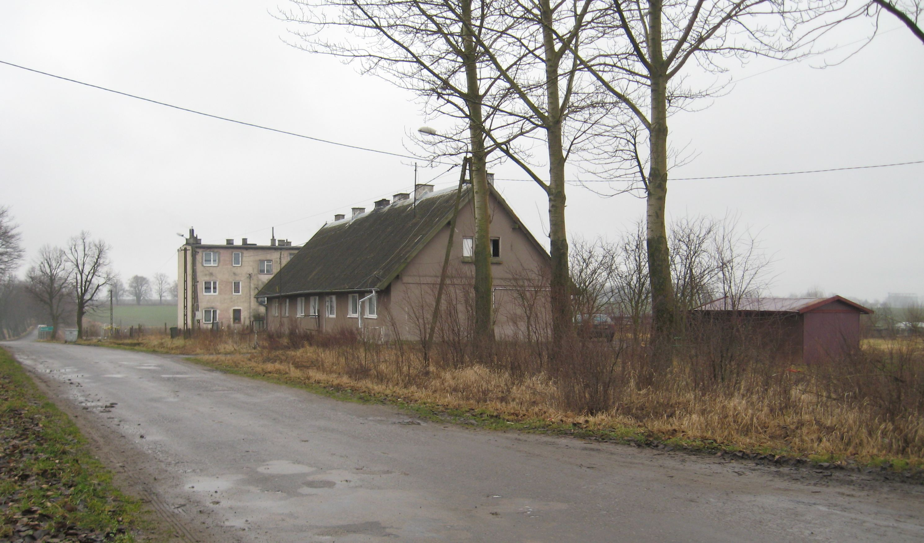 The village Kiemławki Wielkie in Poland - OpenStreetMap (Info)